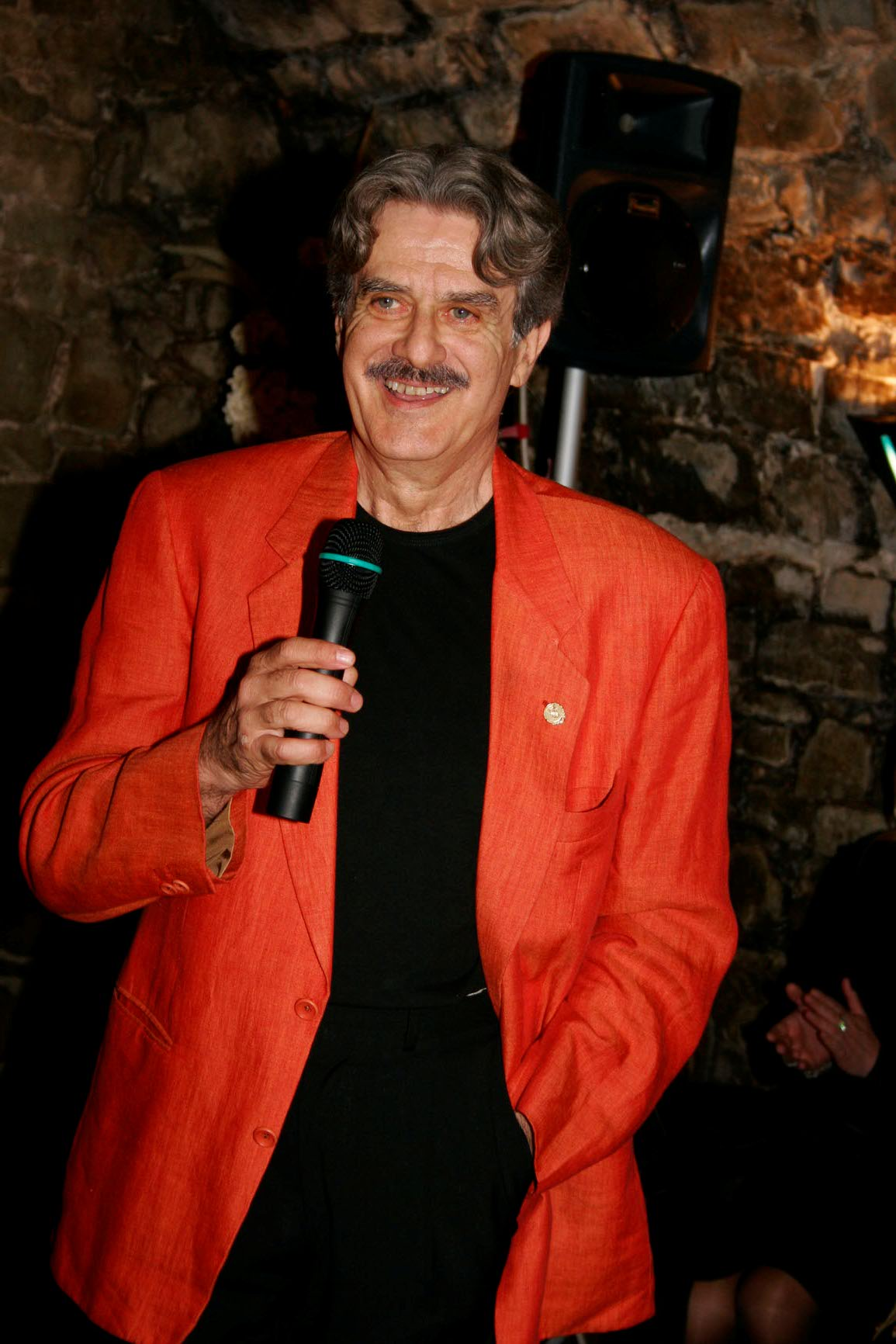 Foto da me scattata a Capriva (GO) il 1 giugno 2006, al "PREMIO CASANOVA - CAVALIERE DI SEINGALT"